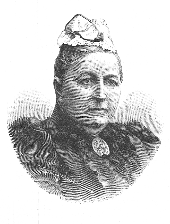 Mathilda Lönnberg